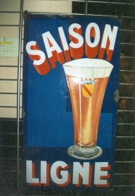 drapeau de la biere saison fabriquée à ligne